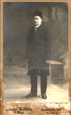 Ere Kolu 1920-luvulla